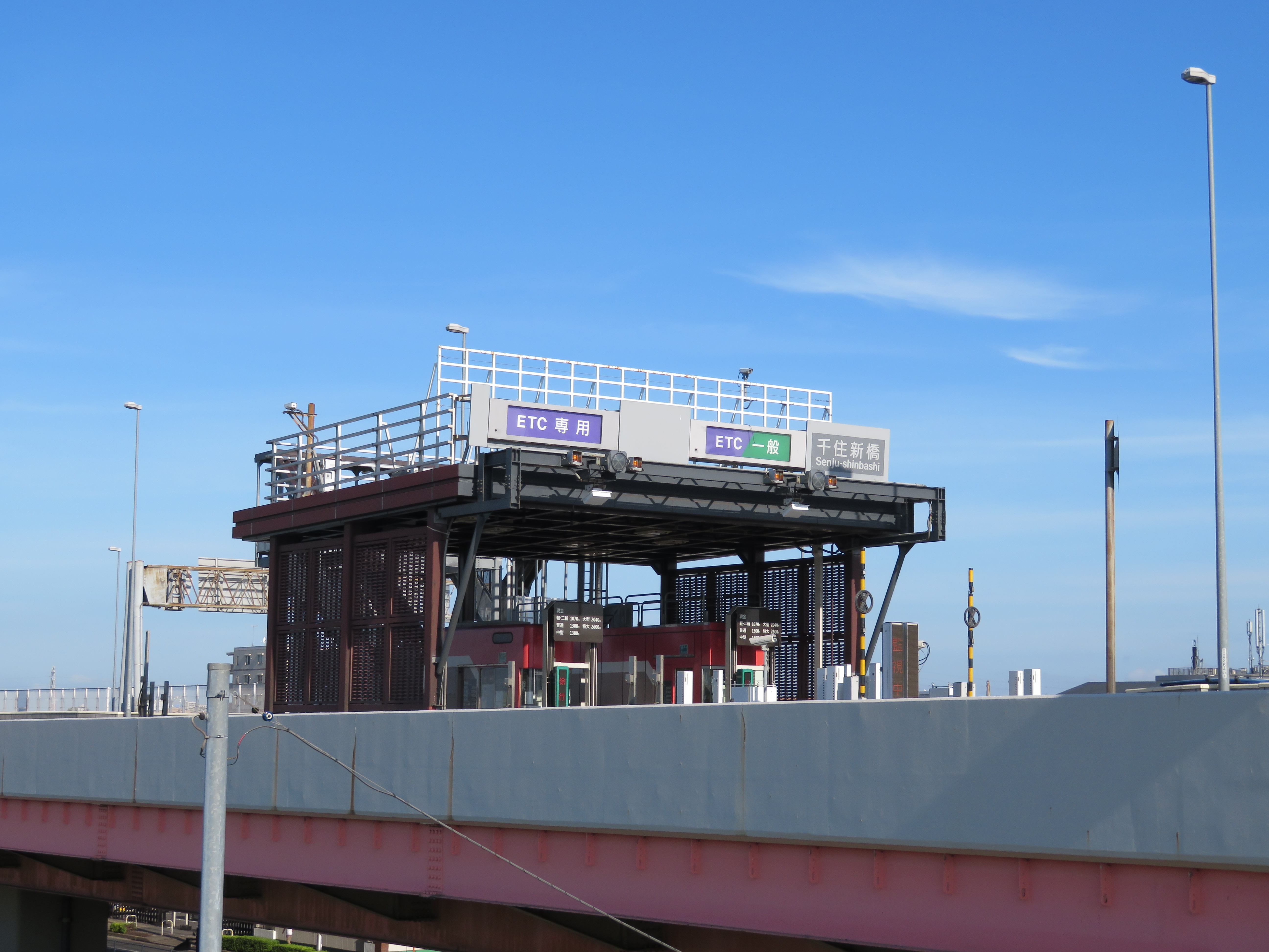 首都高速中央環状線千住新橋入口料金所（江北ＪＣＴ方面側入口を撮影） Canon PowerShot SX720 HS